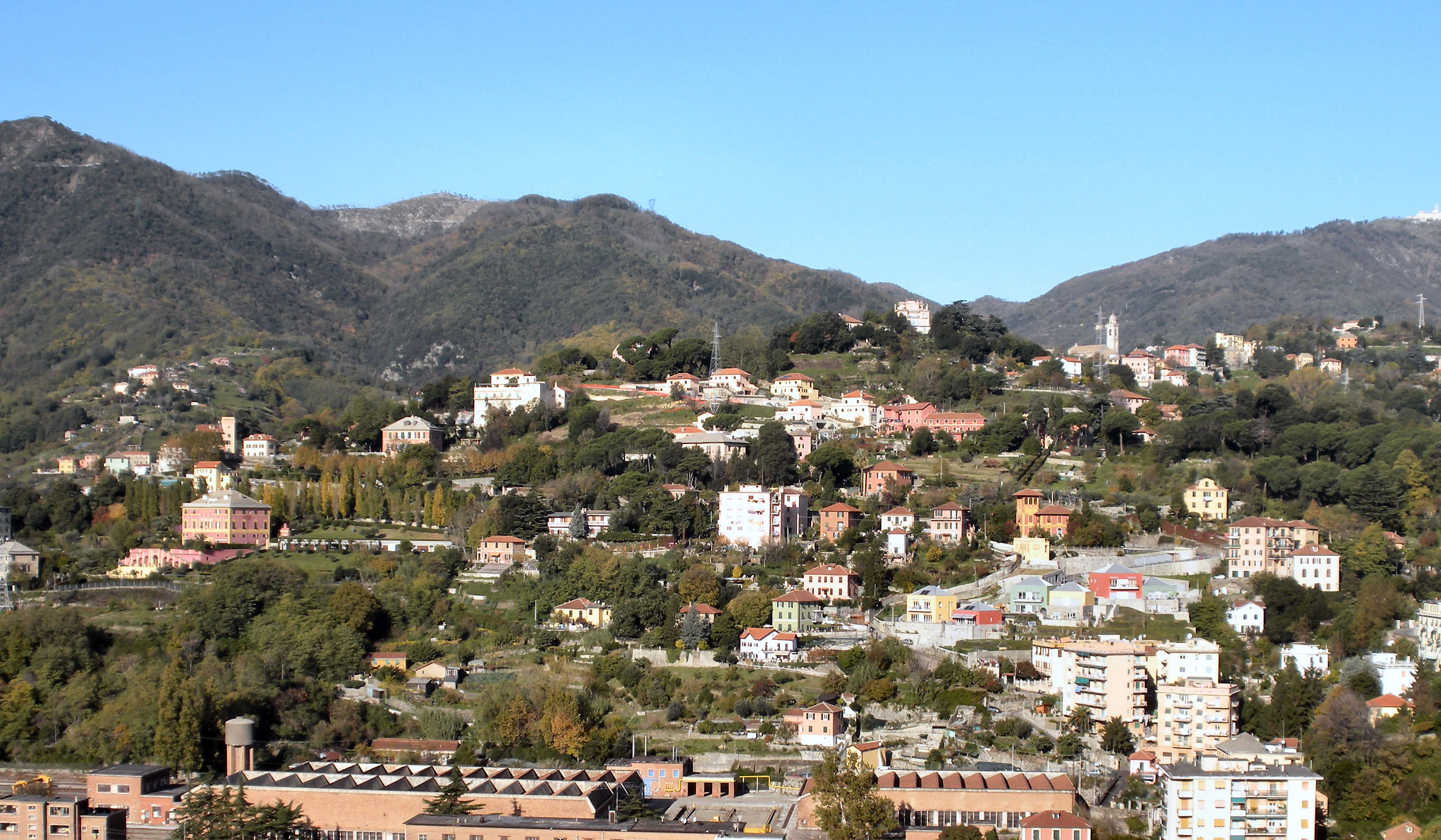 Veduta della collina di Murta (Bolzaneto, comune di Genova)